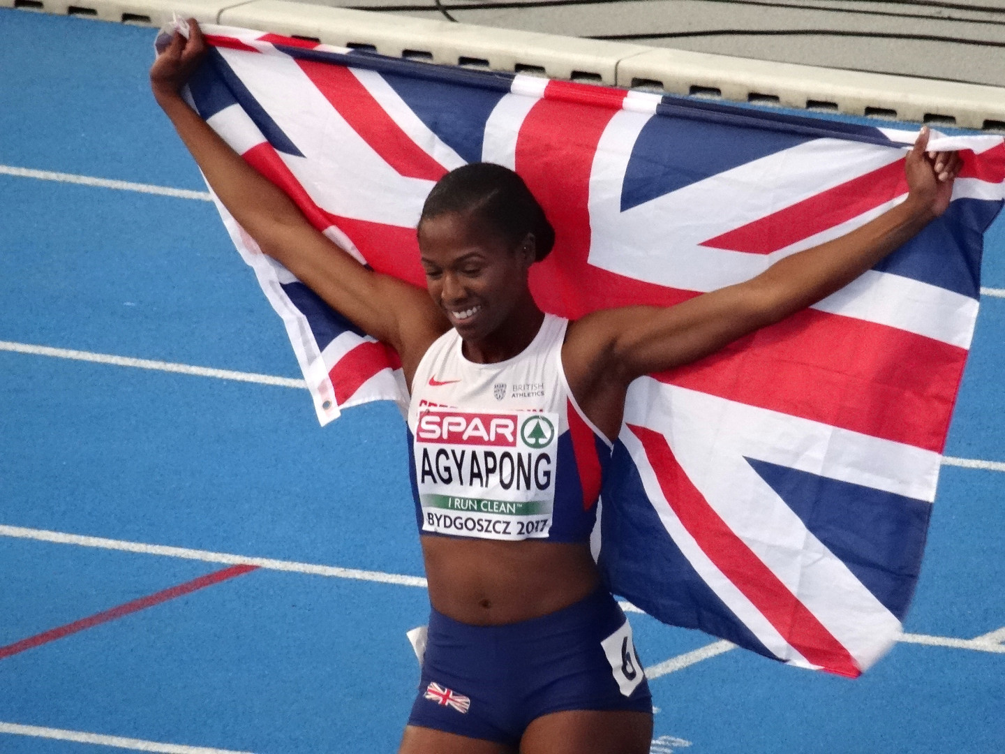 Młodzieżowe Mistrzostwa Europy w Lekkoatletyce U23 w Bydgoszczy 13-16 lipca 2017, finał biegu na 200 m kobiet